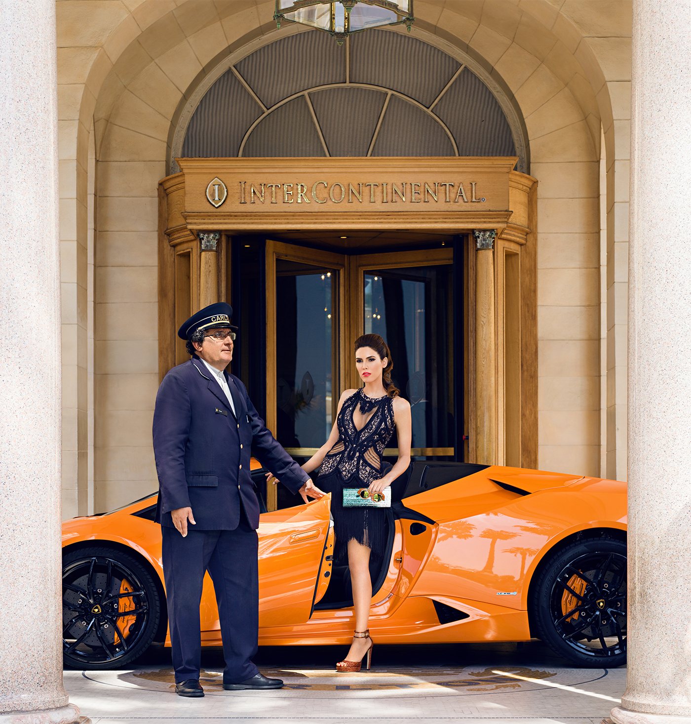 InterContinental Carlton Cannes photographié par Gil Zetbase pour le Palais des festivals de Cannes